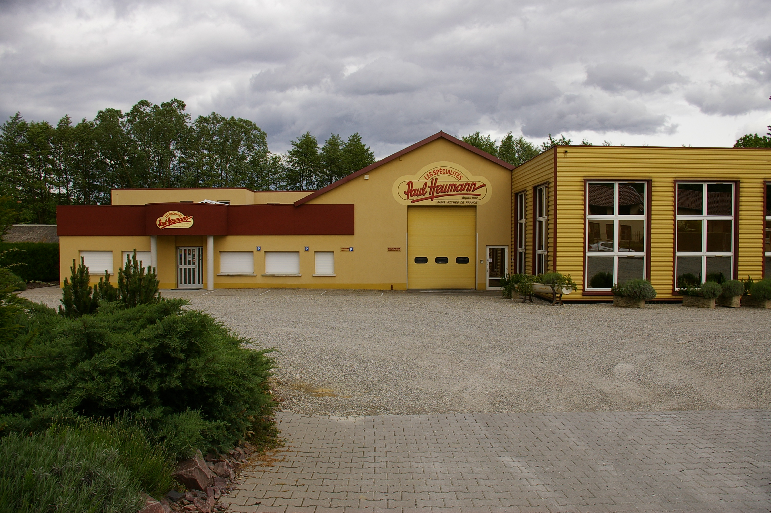 Usine de matzoth Paul Heumann